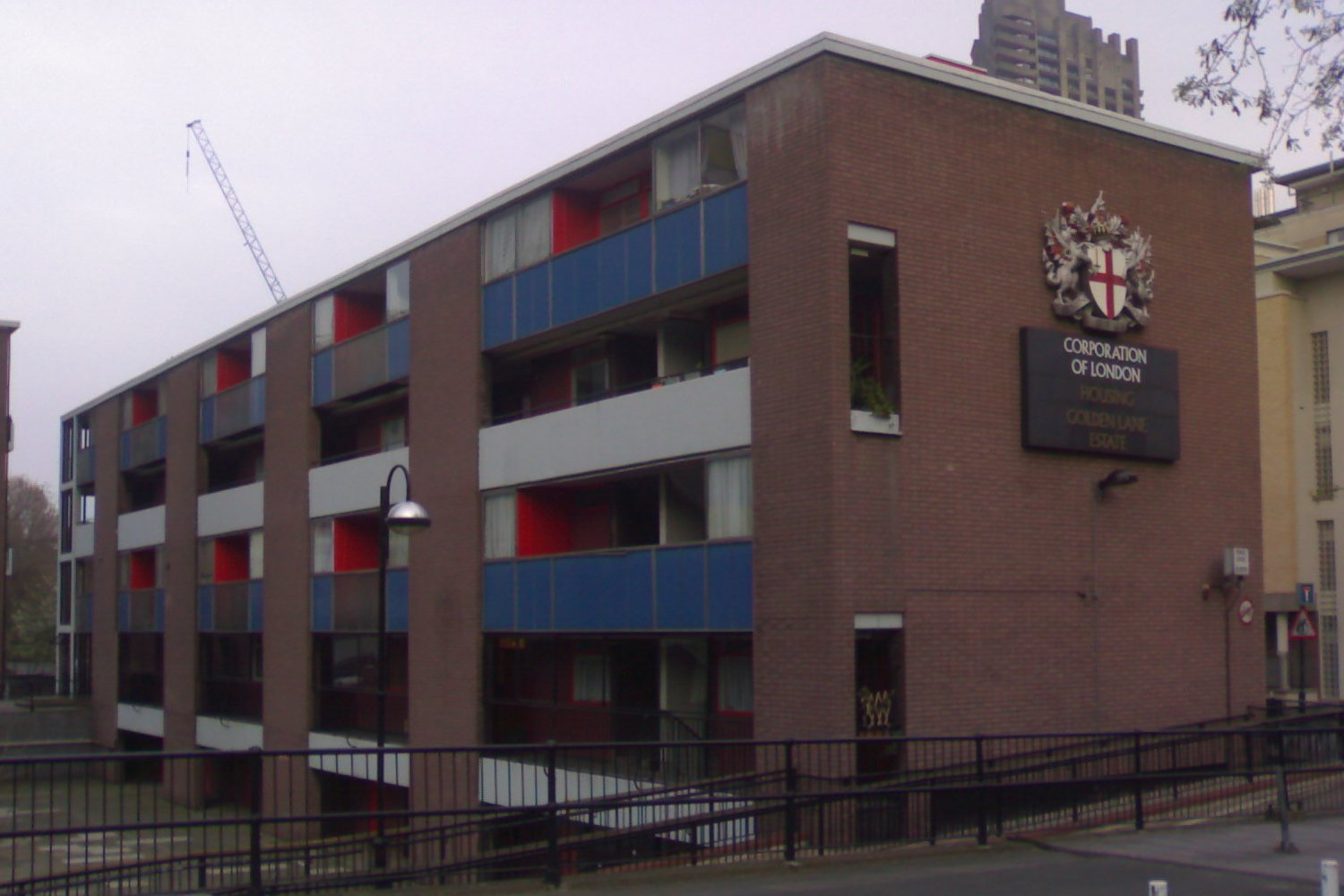 Golden Lane Estate